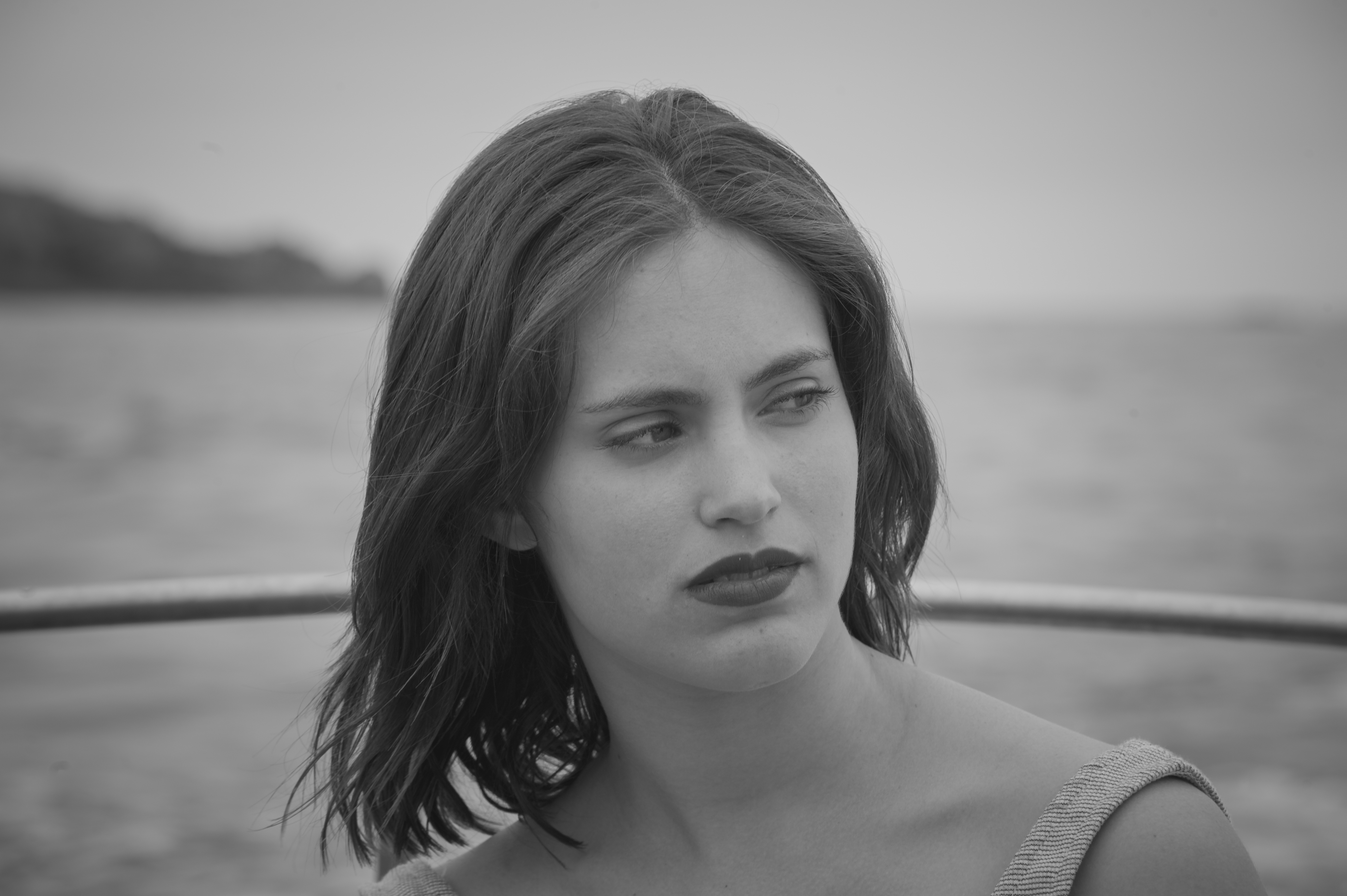 Elena Tarrats